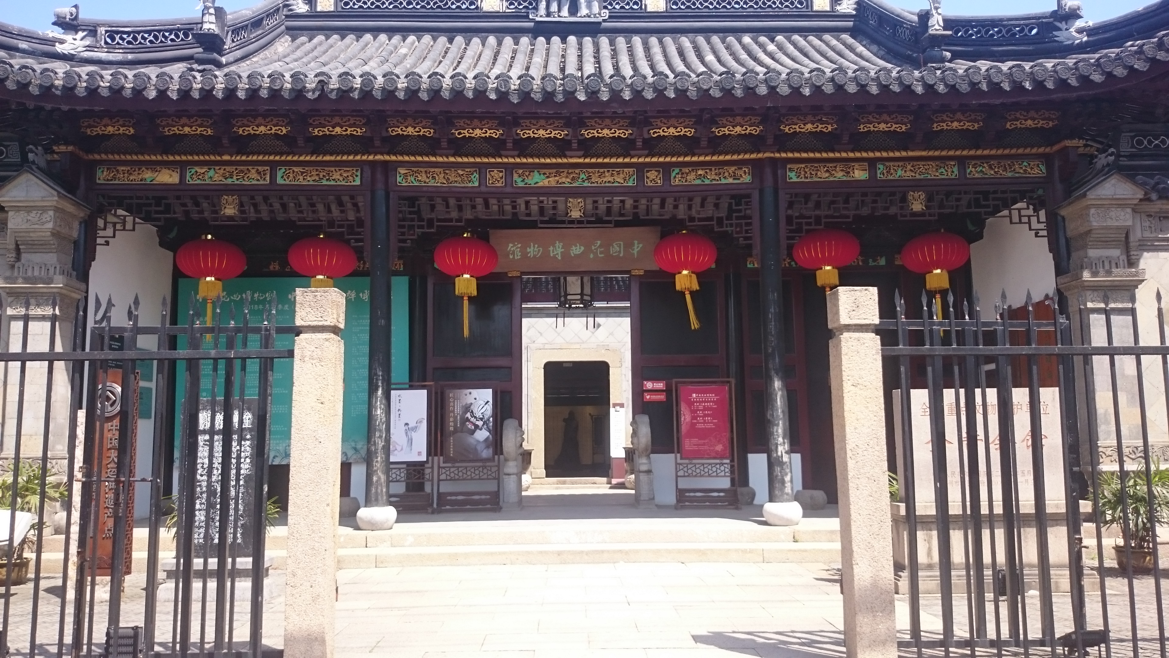 苏州戏曲博物馆 中国昆曲博物馆 全晋会馆 正门